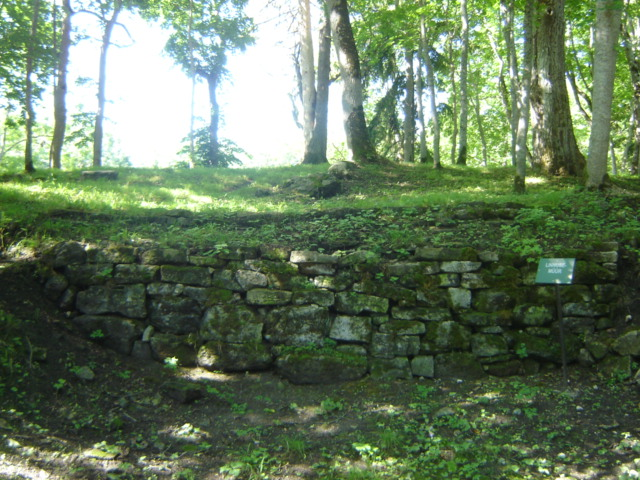 Säilinud paekivist laotud linnuse kuivmüür